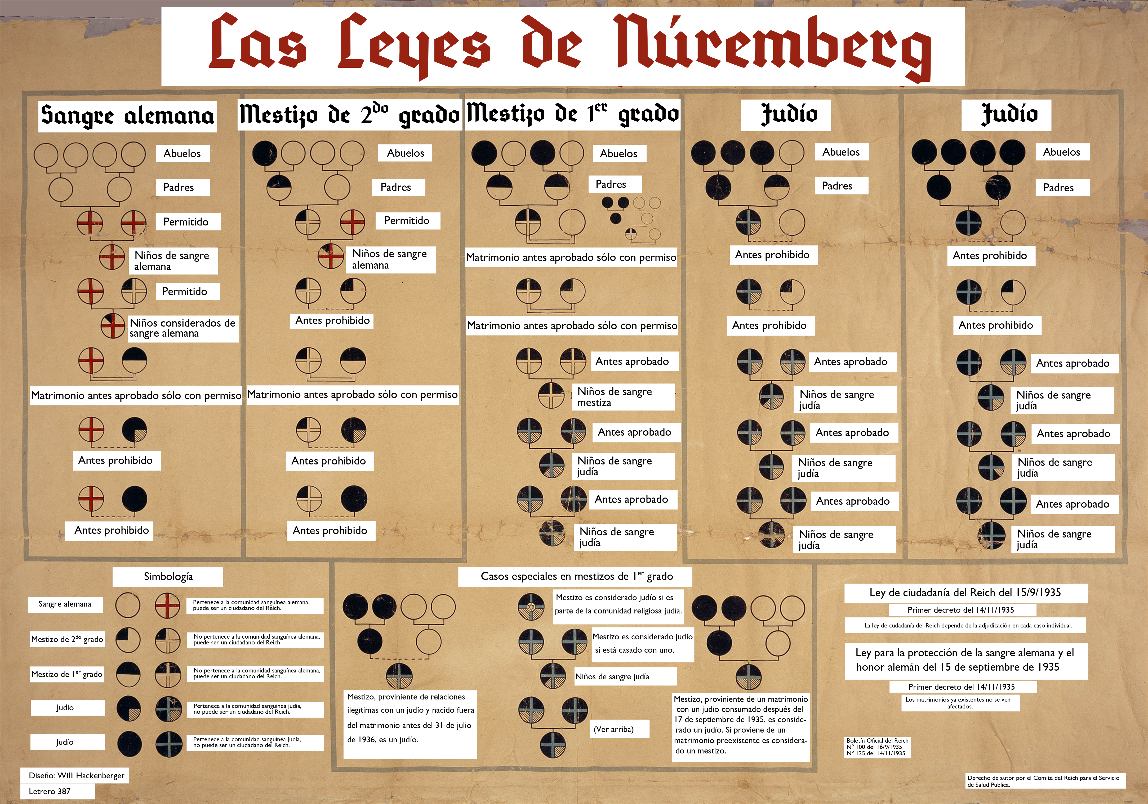 Carta explicativa de las castas sangúineas que establecieron los Nazis en las Leyes de Núremberg de 1935, con traducción al español superpuesta. Gráfico en el dominio público al ser expedido por el Gobierno Alemán como parte de un decreto o ley.